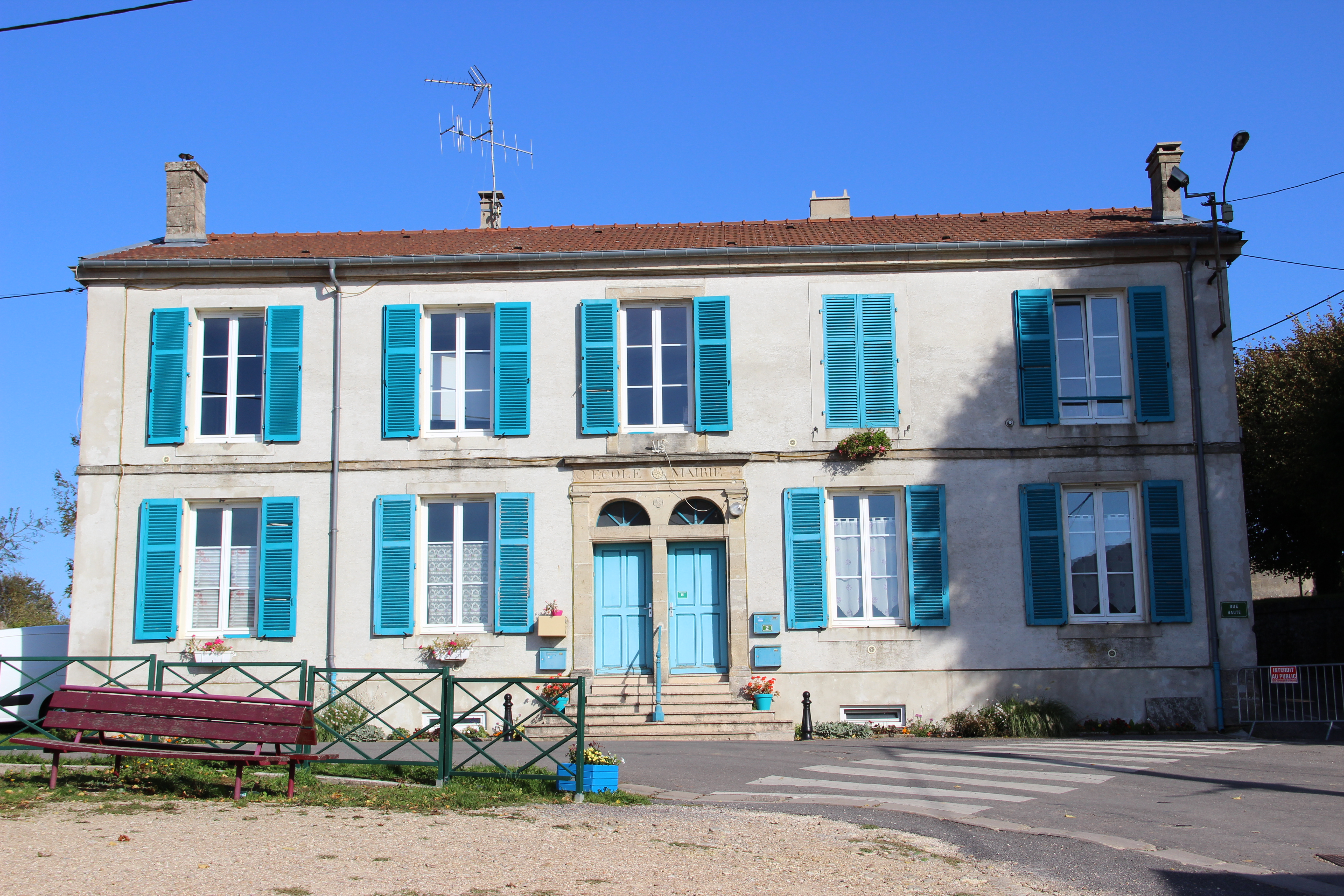 La mairie